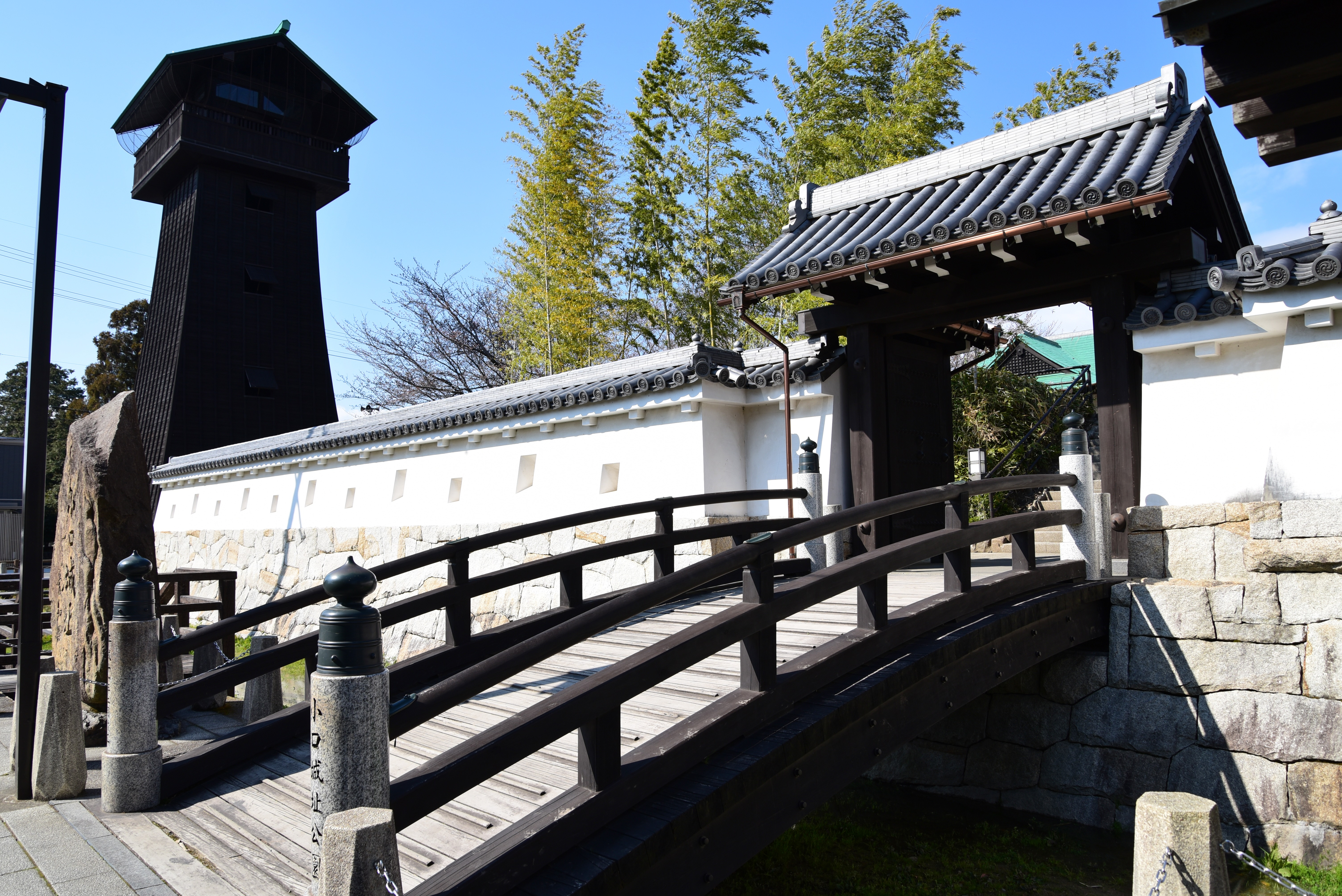 小口城址公園